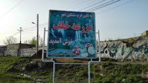 روستای مزرعه خلف2